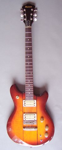 Ibanez_Studio_ST-200_electric_guitar_front